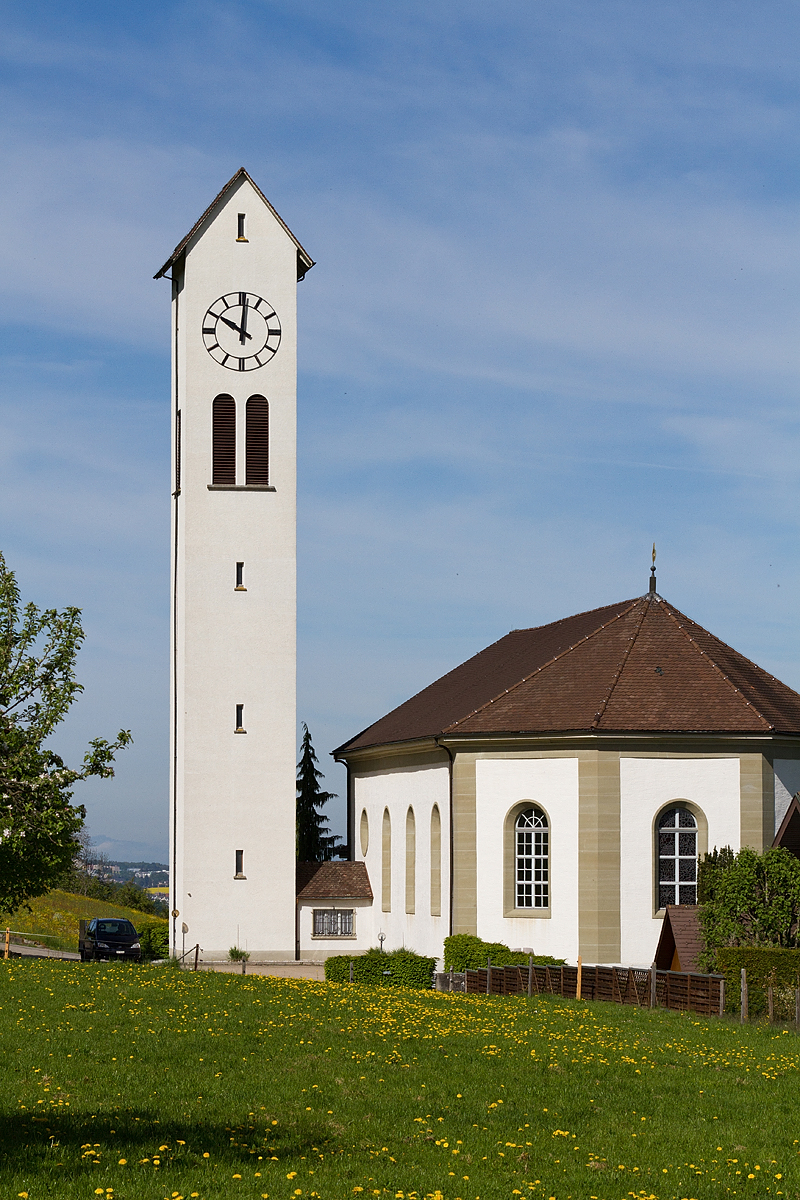 Reformierte Kirche in St. Antoni (FR)